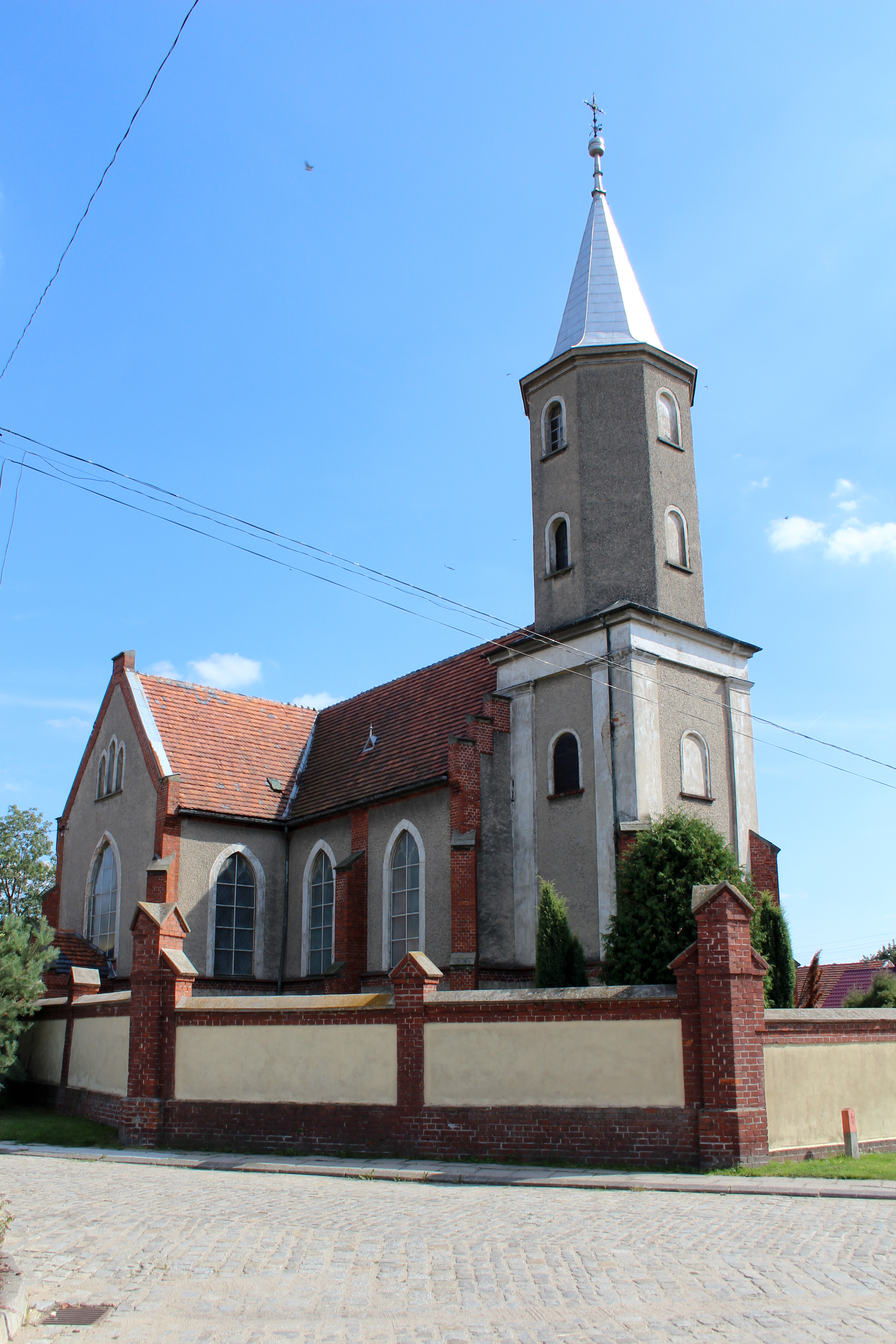 Lubcz - rzymskokatolicki kościół filialny p.w. św. Marcina, 1894.